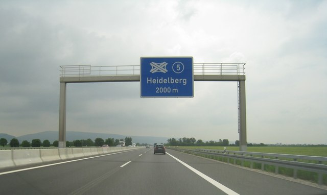 A656 - Kreuz 5, Heidelberg (2000 m)